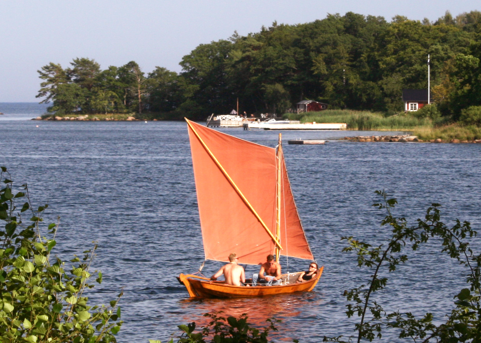 Blekingeeka i Hällaryds skärgård utanför Karlshamn